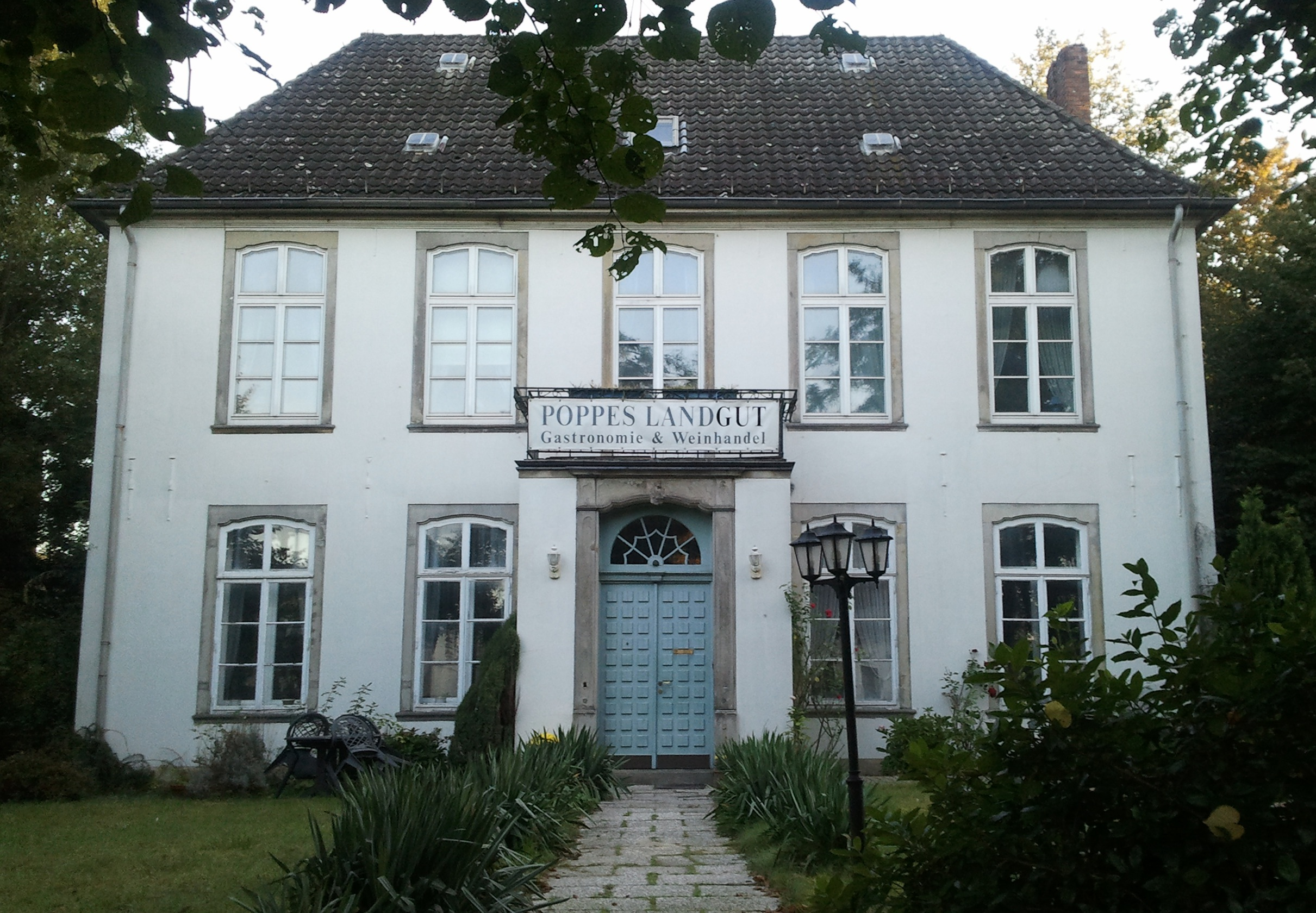 Poppes Landhaus in Bremen, Arsterdamm 10.Das abgebildete Objekt ist ein geschütztes Kulturdenkmal in der Freien Hansestadt Bremen, mit der Nr. 0091,T beim Landesamt für Denkmalpflege registriert.